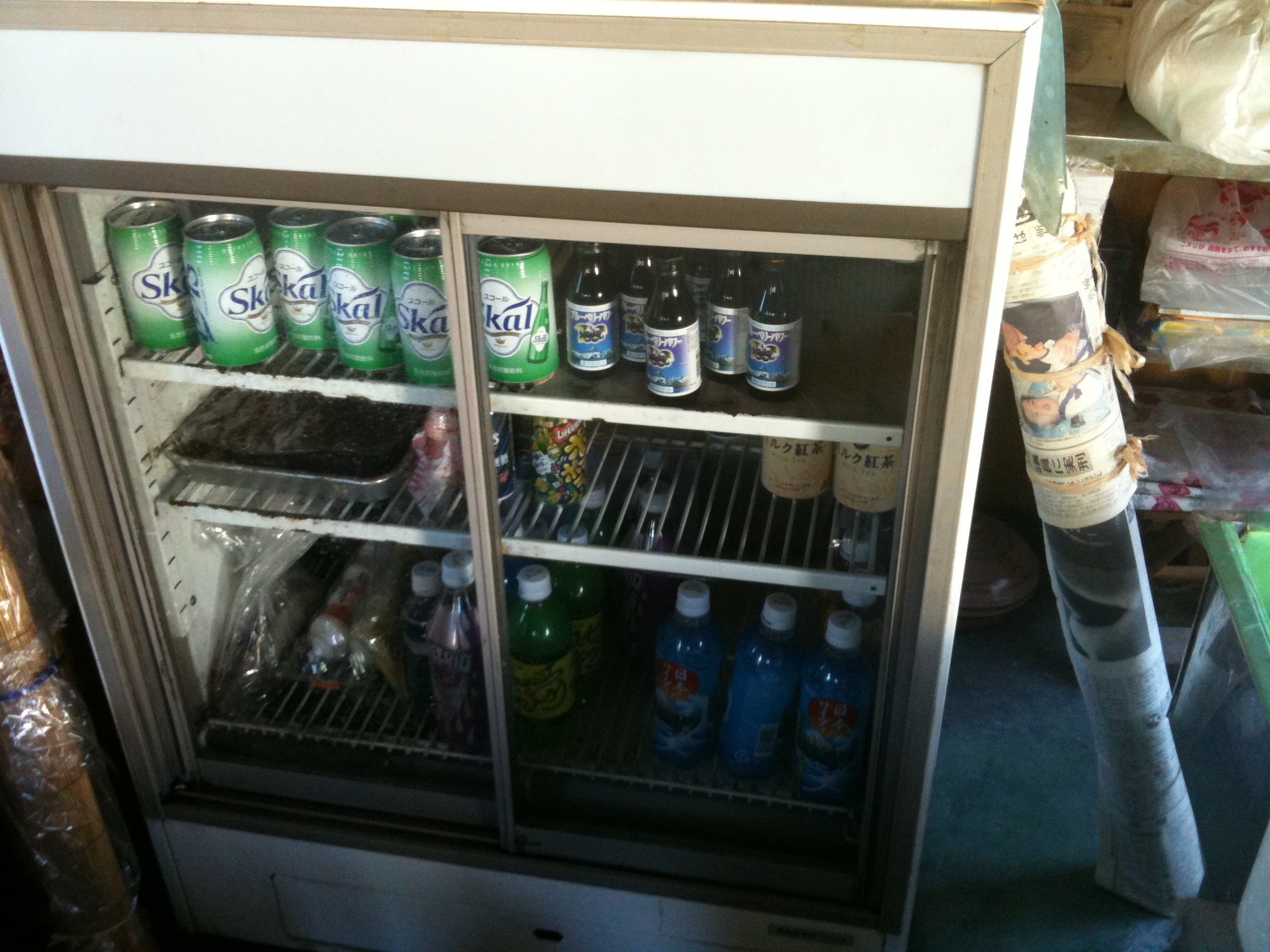 cheerio @ taiyaki shop